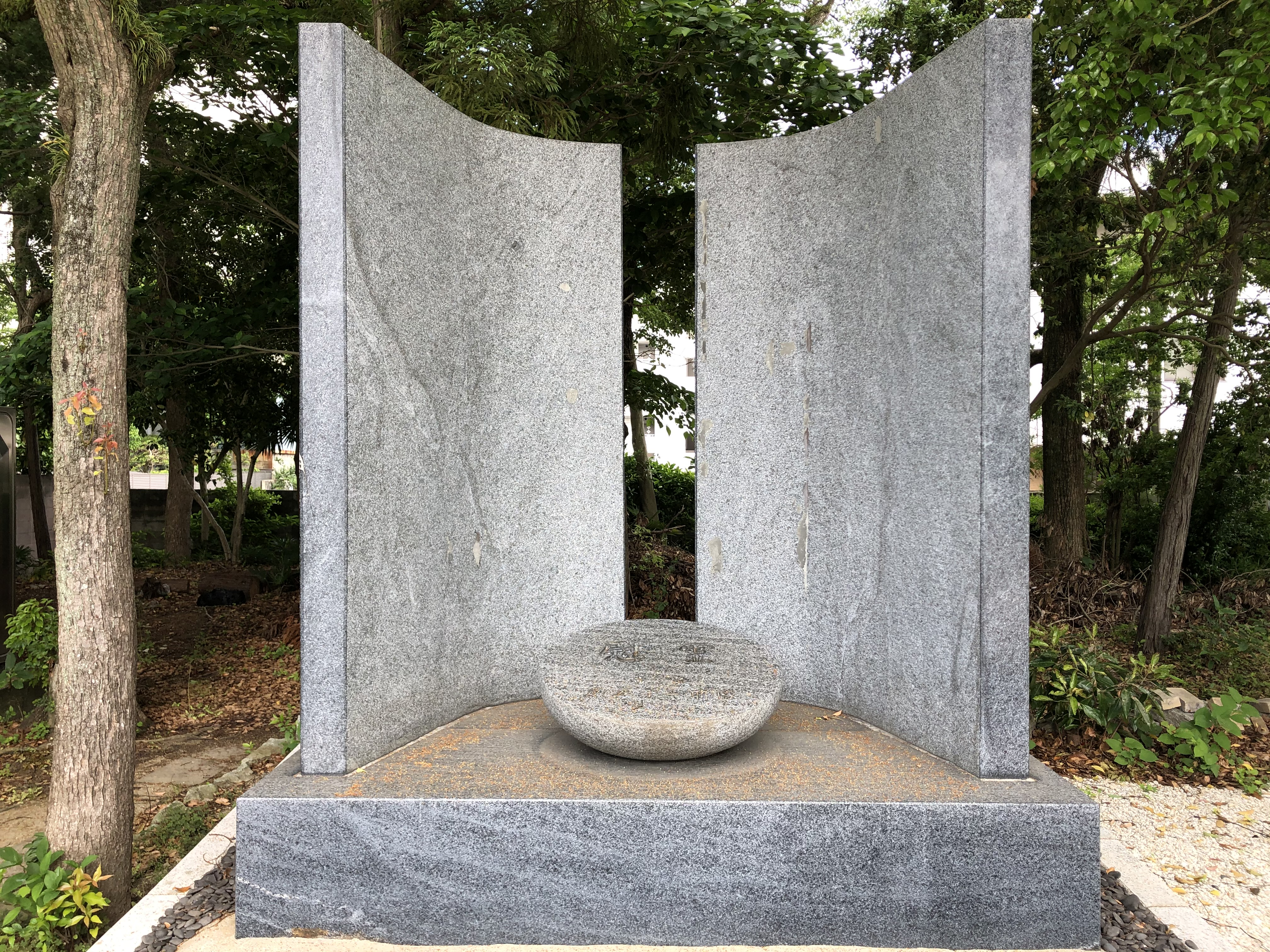 三重県護国神社慰霊碑